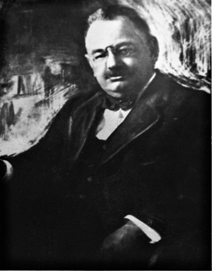 Козло́вский, Мечисла́в Ю́льевич ( 1(13) января 1876, Вильнюс, — 3 марта 1927, Москва) — юрист, участник российских, польских и литовских революционных организаций.